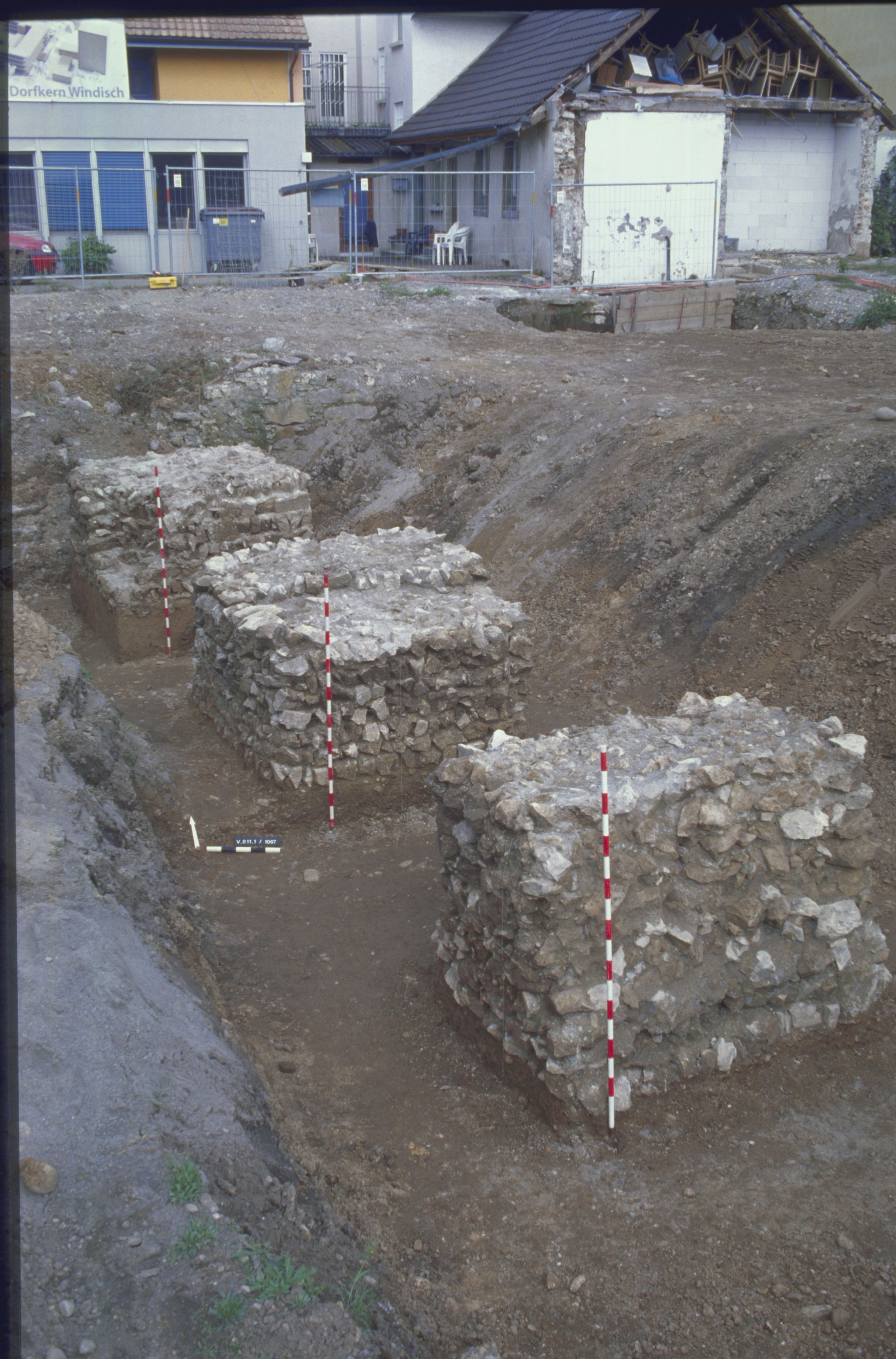 Ausgrabungen der Kantonsarchäologie Aargau Objekt: Aquaeduktbrücke von Vindonissa Ort: Windisch, Dorfzentrum Datierung: 1. Jh. n. Chr. Aufnahmedatum: 2011 Anlass der Grabung: Im Vorfeld eines grossen Bauprojektes im Dorfzentrum von Windisch hat die Kantonsarchäologie Aargau von Juli 2011 bis August 2012 ein rund 4400 m*2 grosses Areal zwischen der heutigen Zürcher-, Dohlenzelg- und Hauserstrasse ausgegraben. Wie aufgrund von früheren Grabungen zu erwarten, tangierte die Grabung eine Nord-Süd verlaufende Aqueadukt-Brücke. Beschreibung: Es konnten insgesamt zehn Pfeilerfundamente der Aquaeduktbrücke nachgewiesen werden. Es handelt sich um durchschnittlich 2,1 x 2,1 m messende und maximal 1,6 m hoch erhaltene Bruchsteinfundamente. Zwischen den Fundamenten ist jeweils eine Pfeilerbreite (2,1-2,5 m) ausgespart. Die Fundamente bestehen aus lageweise eingebrachten, im Mittel rund 0,25 m langen Kalkbruchsteinen (Muschelkalke und Dolomite). Dabei sind die Bruchsteine direkt gegen die senkrechte Baugrubenwand gesetzt. An den gut erhaltenen Fundamenten lassen sich 8 bis 10 Steinlagen erkennen. Literatur: Matthias Flück: "… es blieb somit nur noch der Vermutung Raum, der Sockel habe ein grosses Standbild getragen": Vorbericht zur Ausbrabung Windisch-Dorfzentrum 2011-2012 (V.011.1). In: Jahresbericht / Gesellschaft Pro Vindonissa, 2012, S. 57-80.